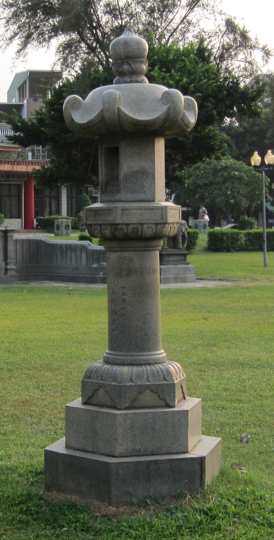 高雄陳中和墓石燈籠。